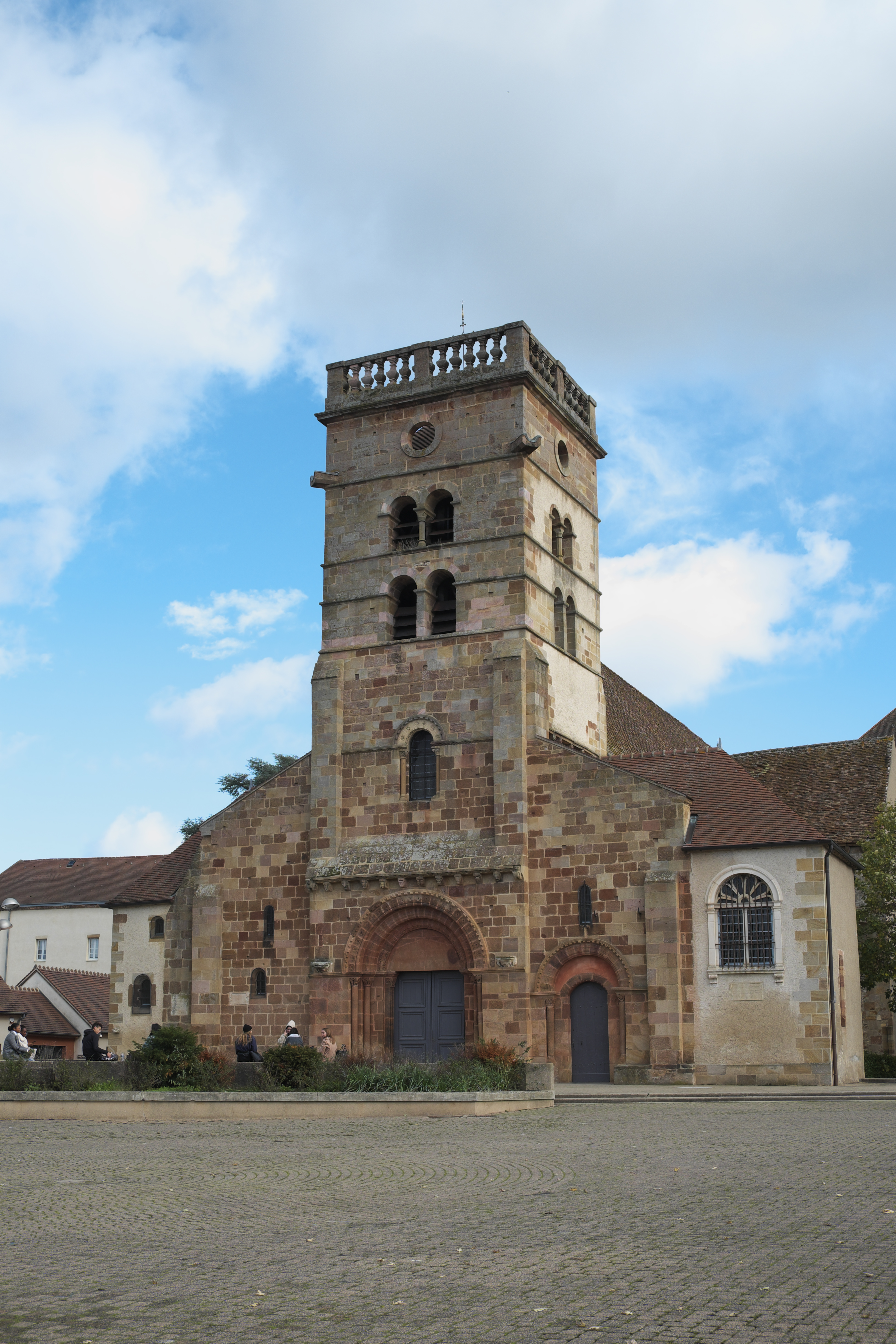 Katholische Kirche Saint-Pierre in Yzeure im Département Allier (Auvergne-Rhône-Alpes/Frankreich), Westfassade mit Glockenturm